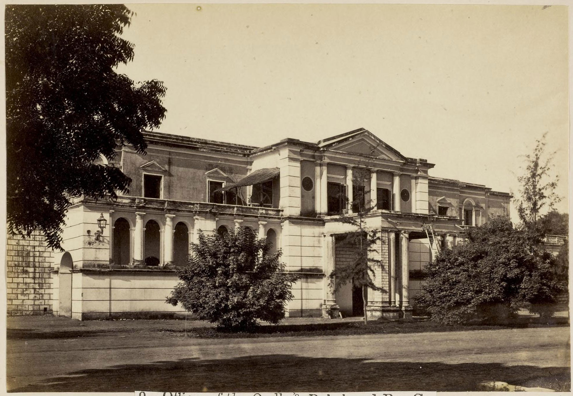 Büros der Rohilkund and Kumaon Railway Company